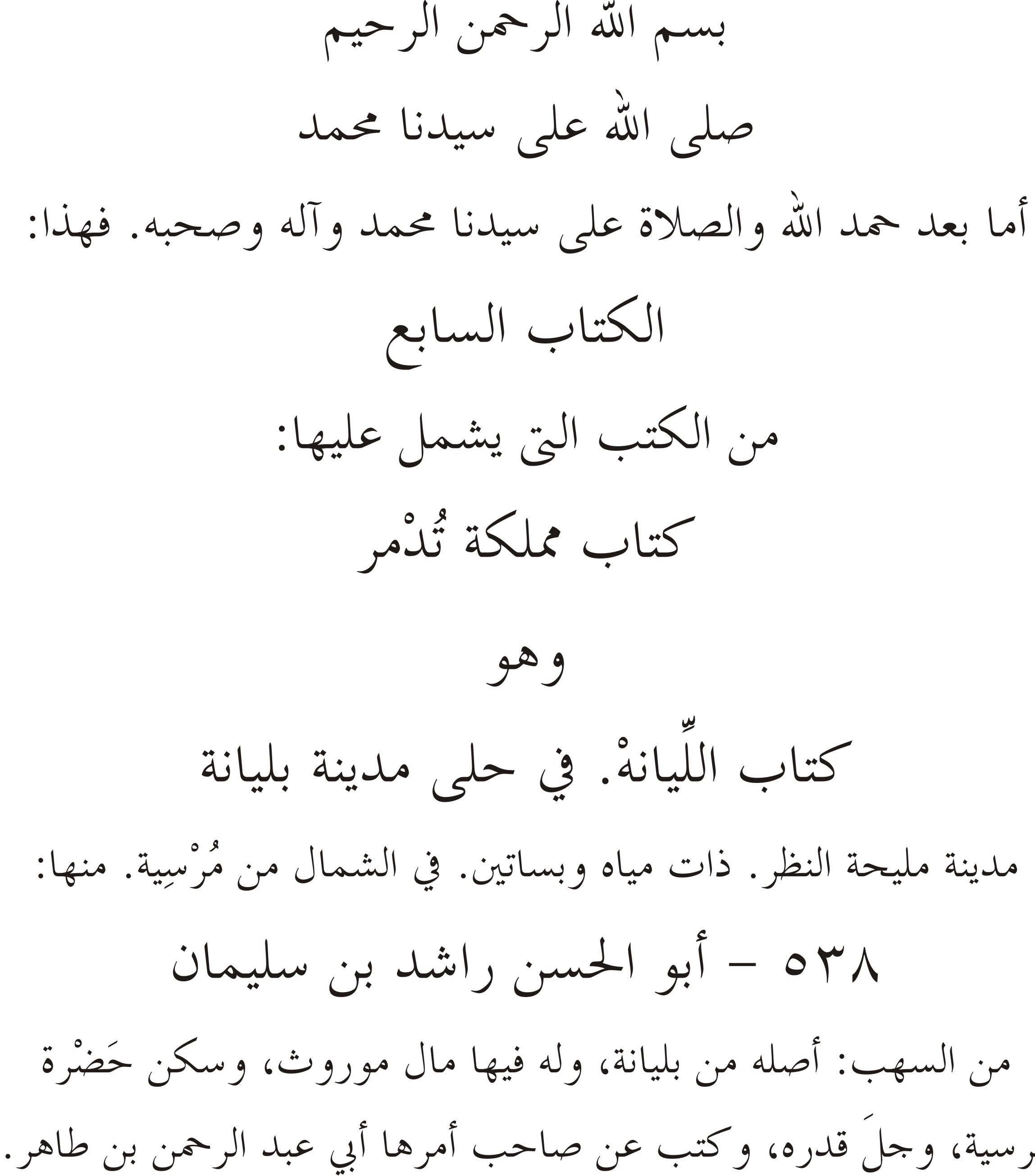 Extracto del capítulo sobre Villena, en el que se habla de Hasán Rashid bin Sulaymán, del libro Al-Mugrib fī ḥulā al-Magrib de Ibn Sa'īd al-Magribī.